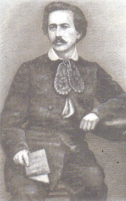 Fotografie von Ernst Rudolf Neubauer